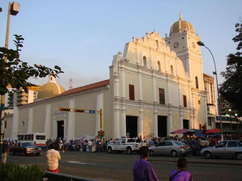 Maracay. Estado Aragua. Venezuela.